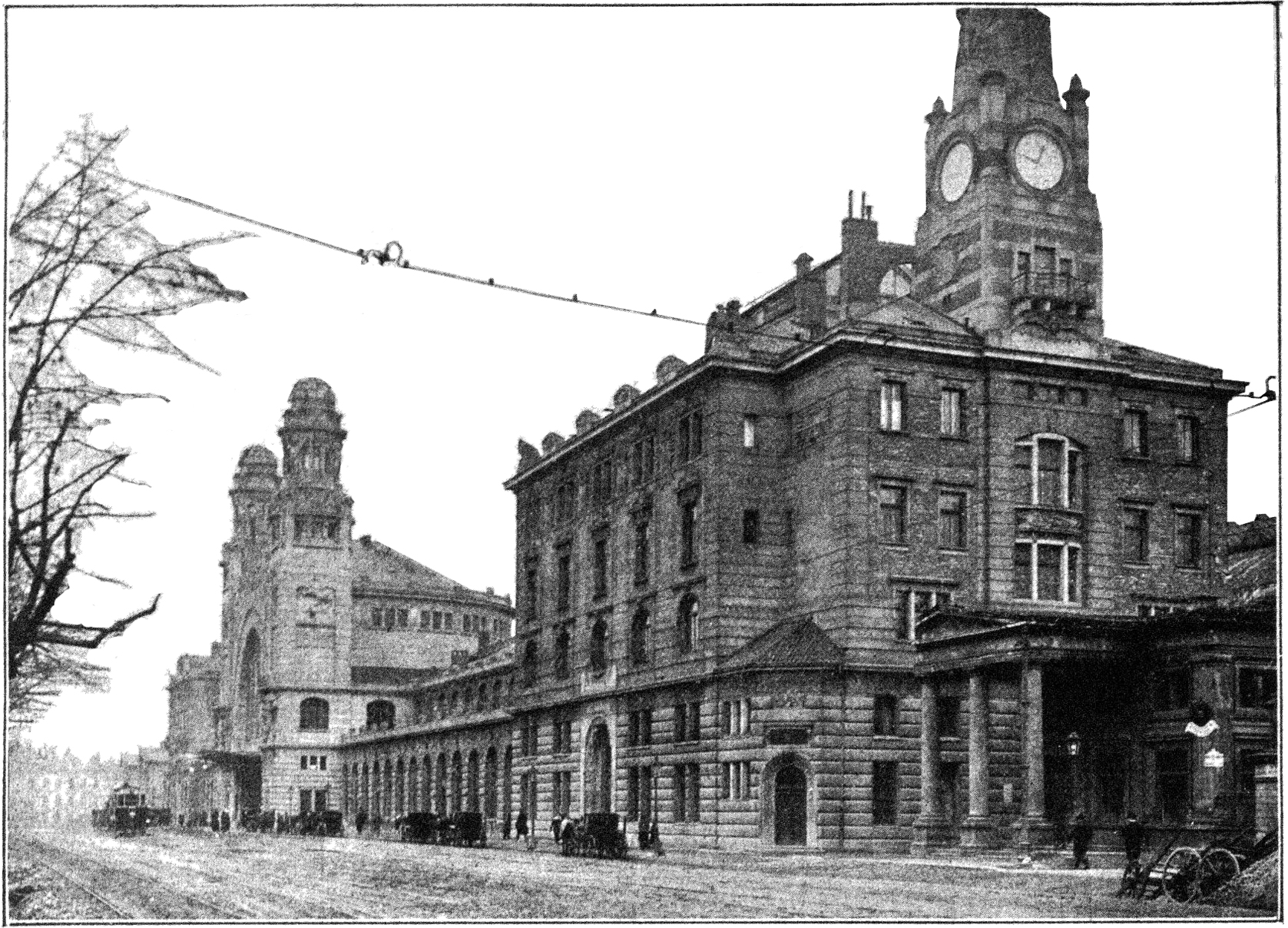 Prag, Neuer Kaiser-Franz-Joseph-Bahnhof